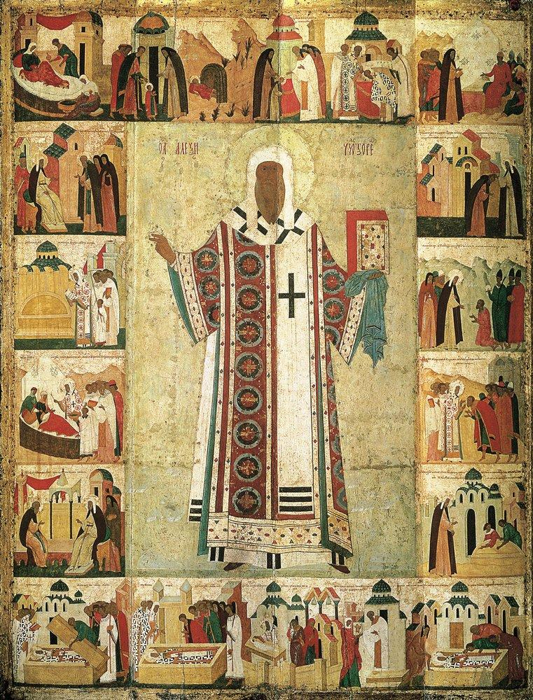 Митрополит Алексий с житием